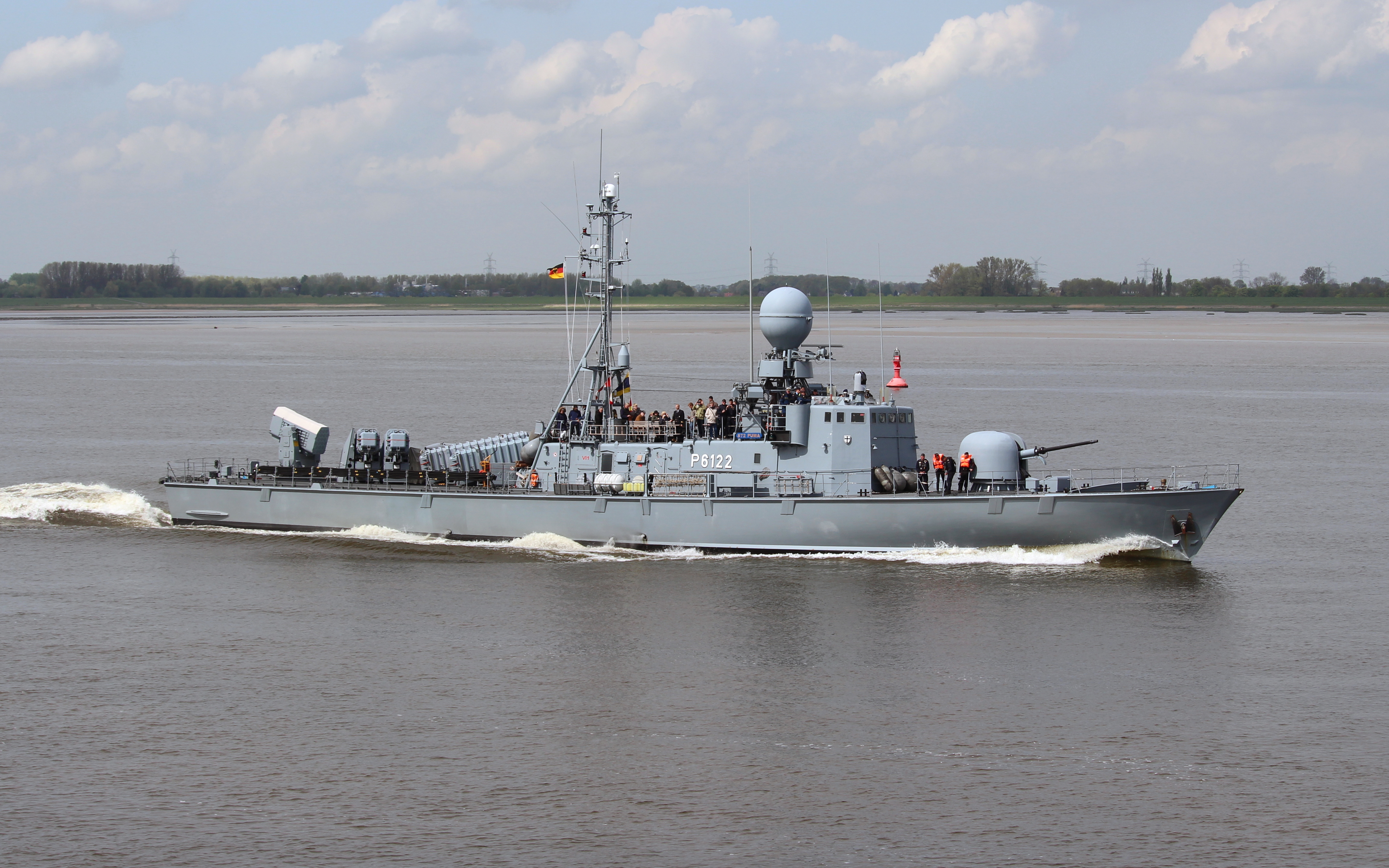 Hamburger Hafengeburtstag 2015: Schnellboot P6122 Puma der Deutschen Marine